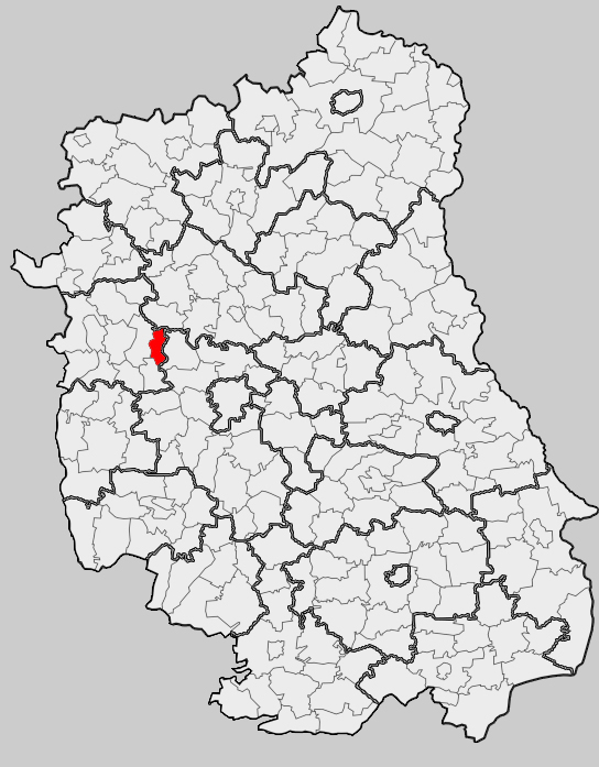 Map of gmina Markuszów, Puławy county, Lublin voivodship Mapa gminy Markuszów, powiat puławski, województwo lubelskie